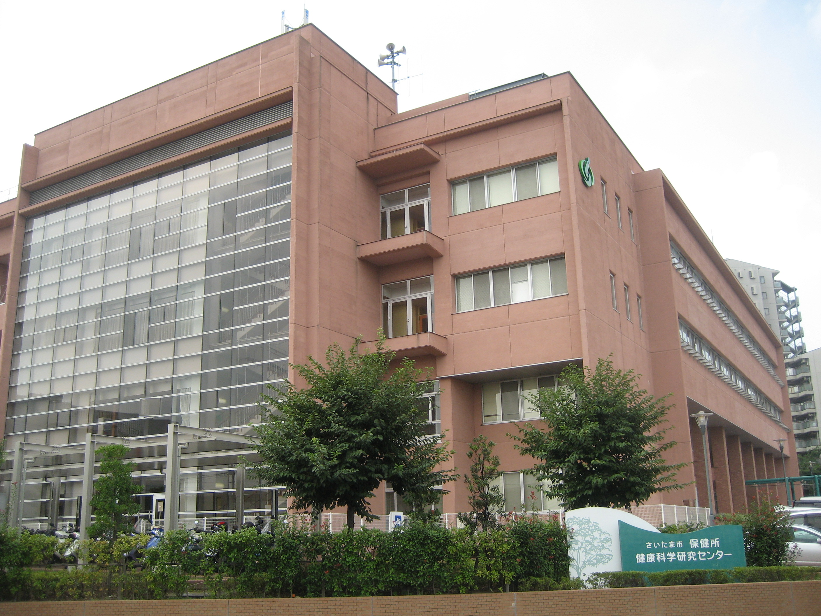 さいたま市保健所庁舎